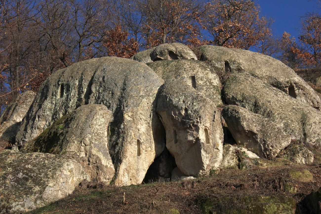 B7a, Szomolya, Kaptár-rét, 5. szikla